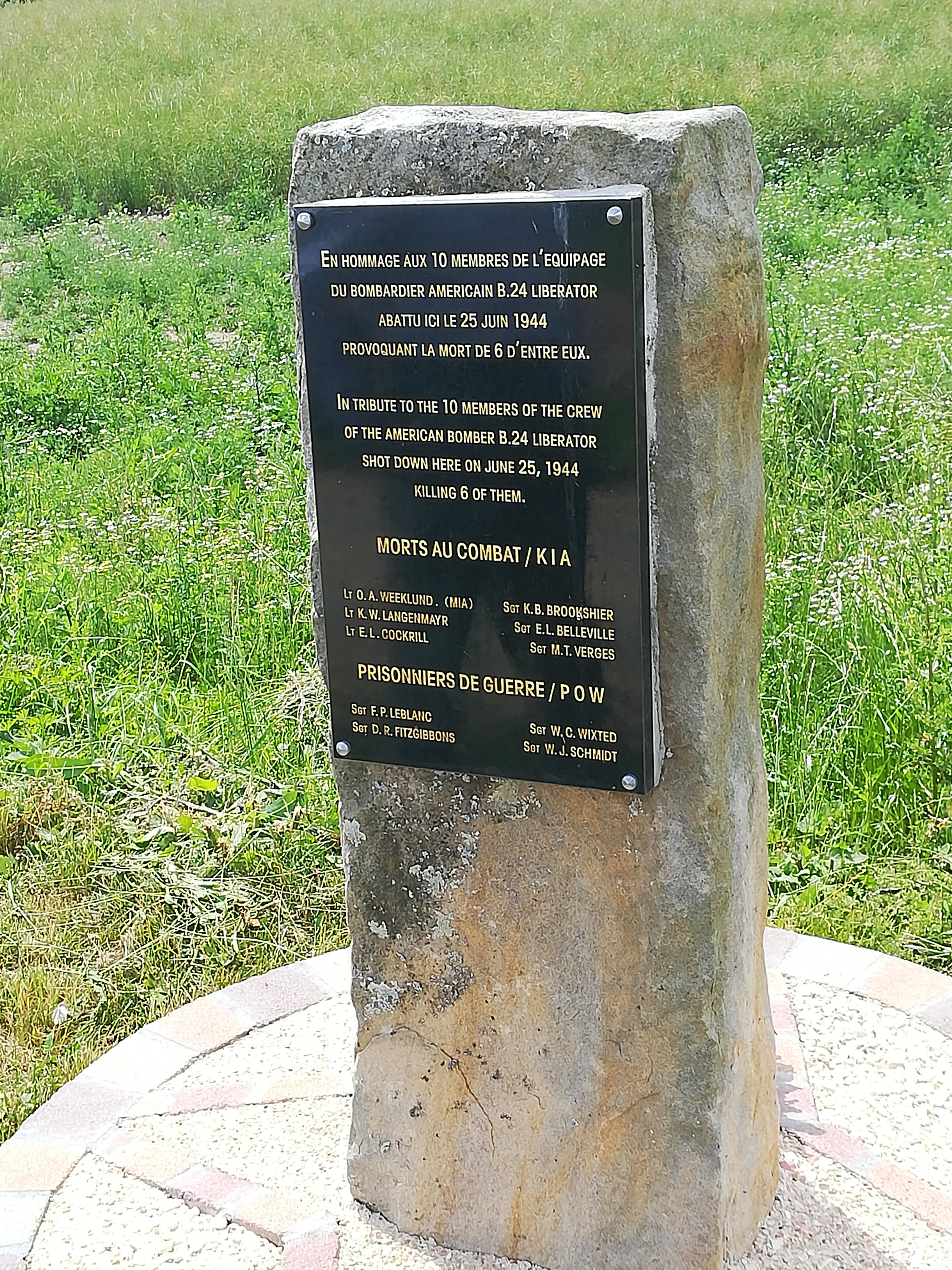 Stèle commémorant l'écrasement d'un B24 Liberator à Brétigny-sur-Orge en 1944.